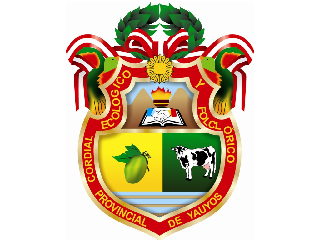 Escudo de la Provincia de Yauyos